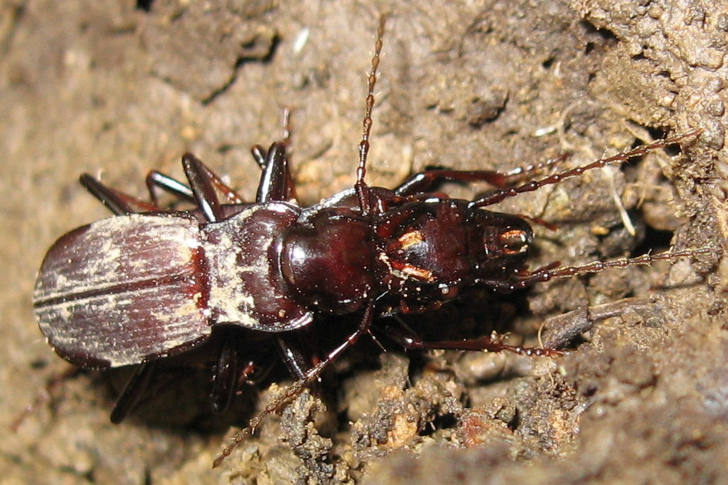 Pterostichus (Natalianoe) microps. Спаривание. Россия, Приморский край, г. Владивосток, лес за Ботаническим садом.